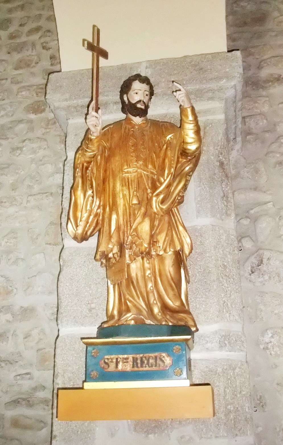 Roiffieux église St François-Régis